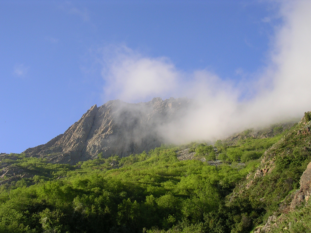 Vista del Cerro La Campana desde el sendero andinista, al interior del Parque Nacional la Campana, subiendo desde el sector Granizo.